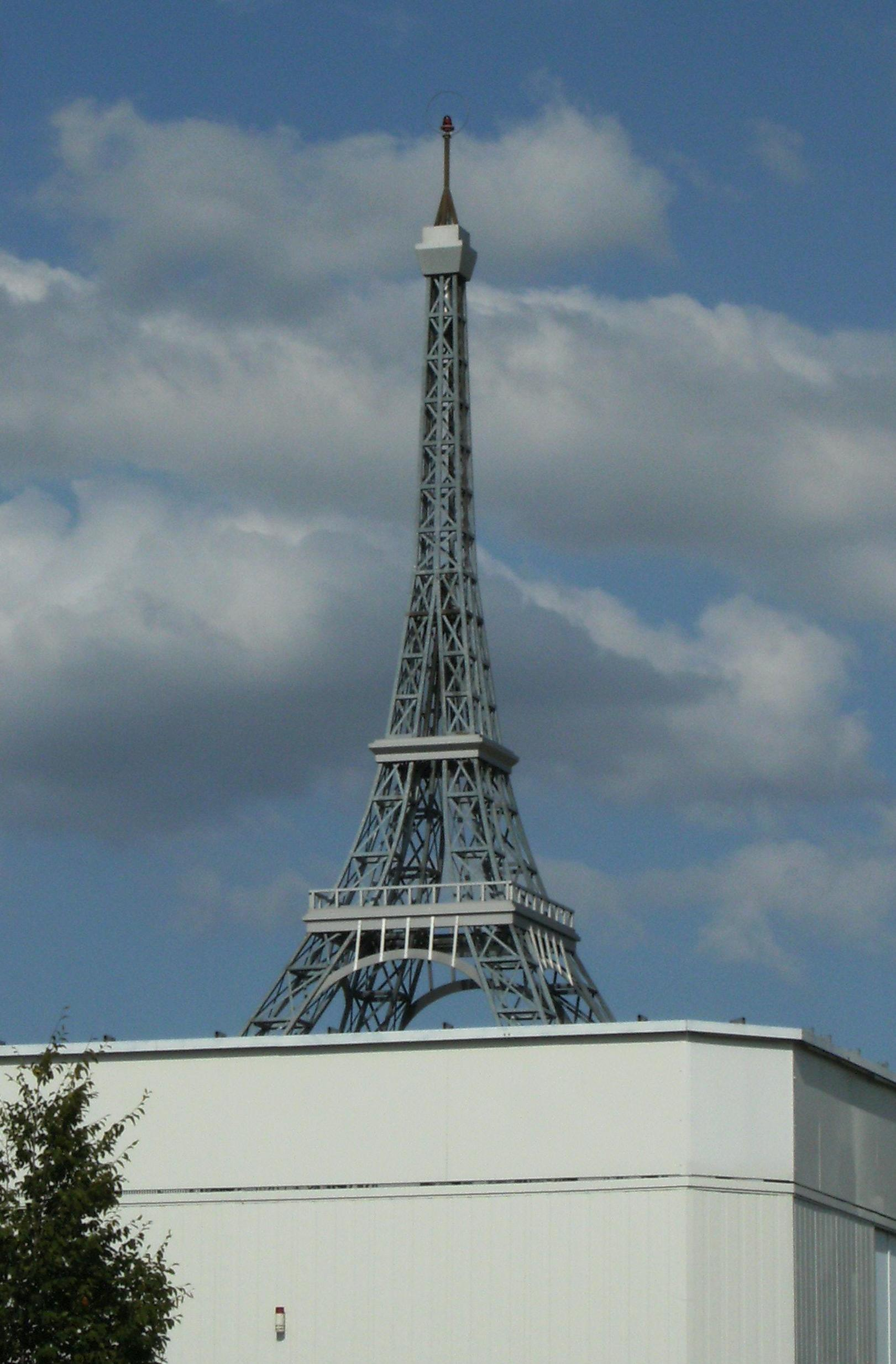 Eiffelturm-Replikation in Satteldorf